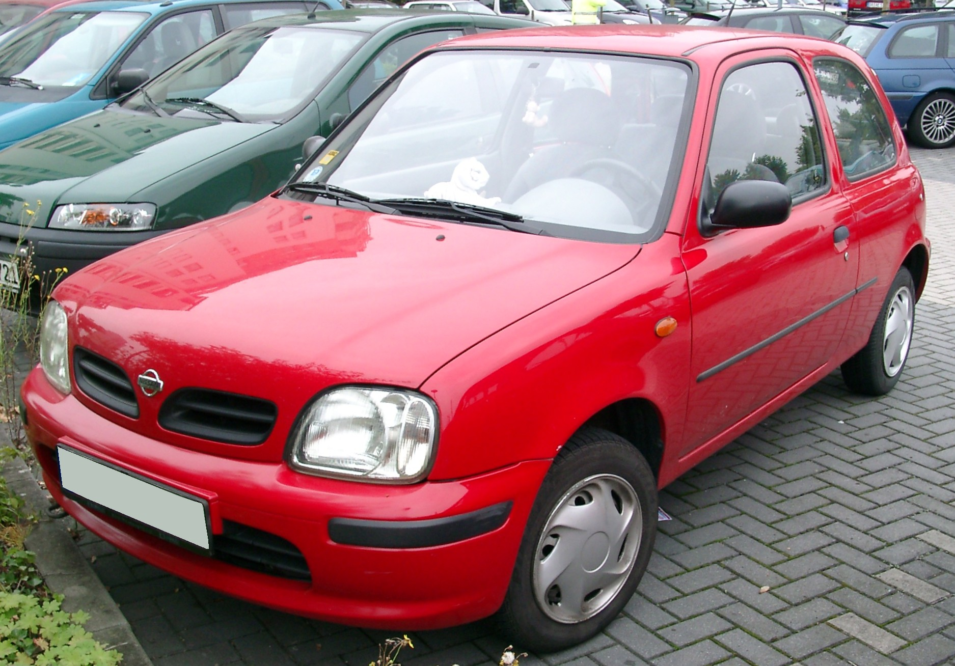 Nissan Micra, 2. Generation